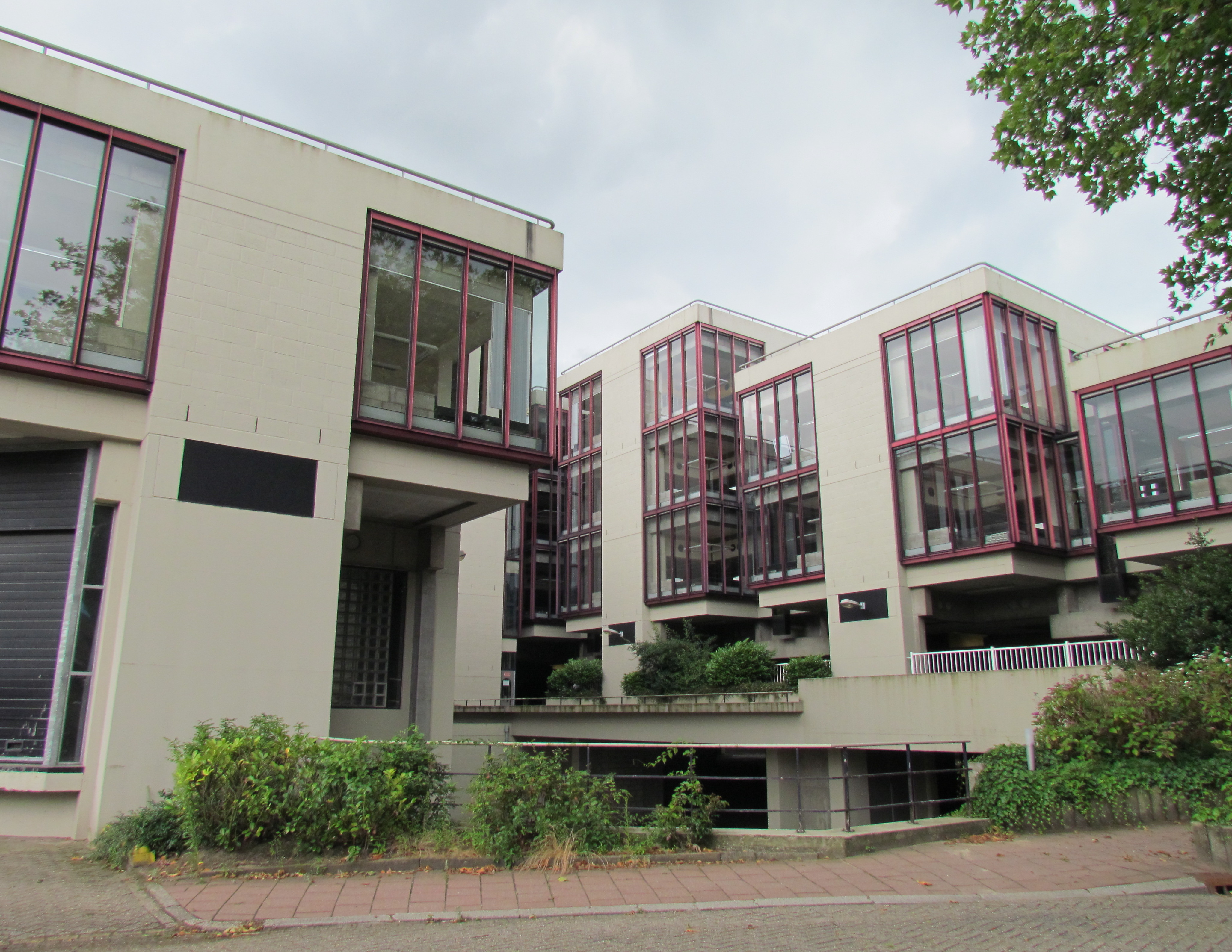 Het Centraal Beheergebouw van Herman Hertzberger (in 2013 verlaten door Centraal Beheer, de Apeldoorn Business Campus nam er vervolgens zijn intrek in).